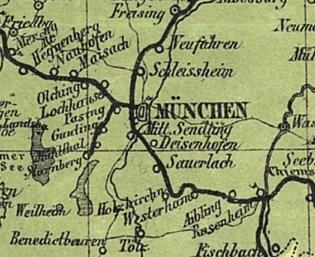 Bahnkarte_Deutschland_1861: Ausschnitt um München